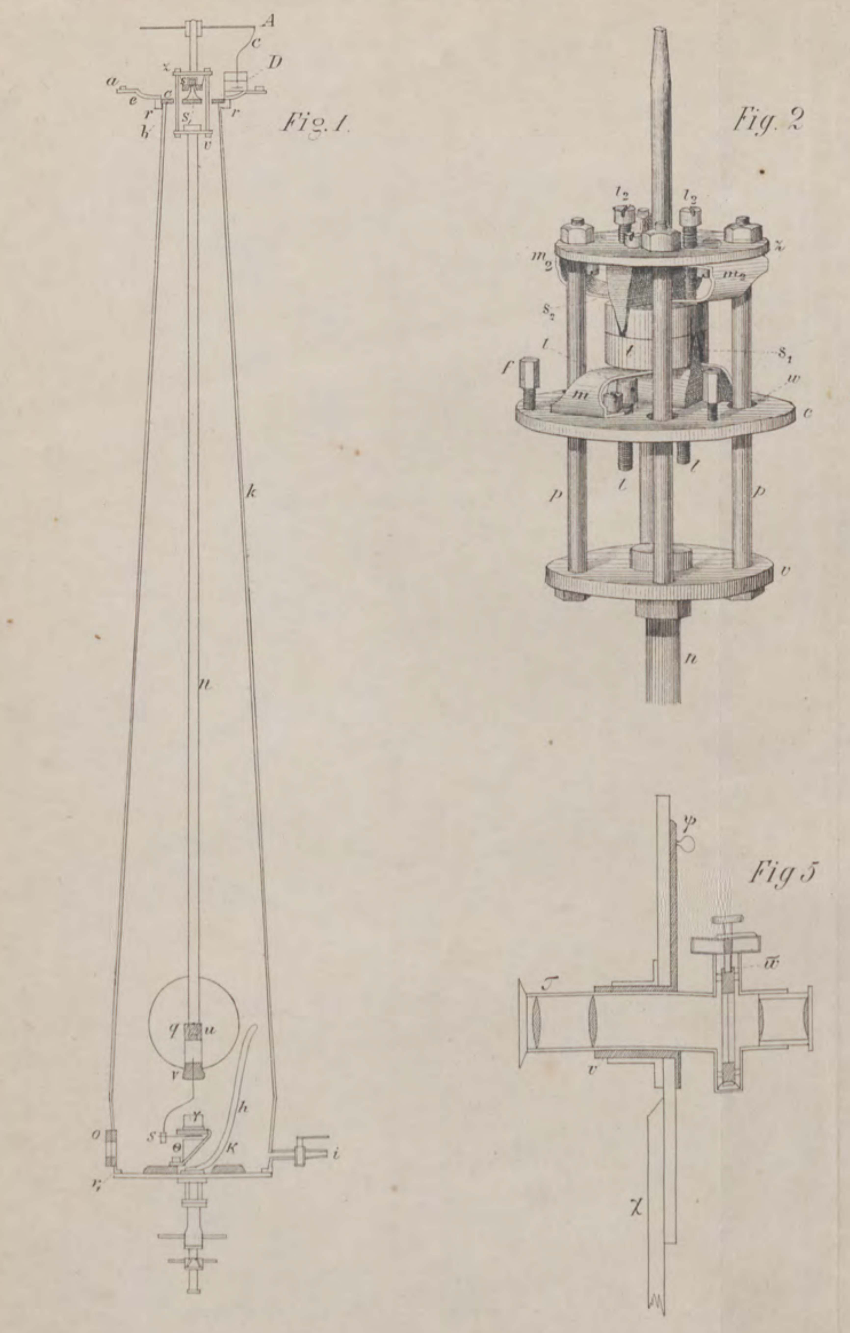 Kamerlingh Onnes"Nieuwe bewijzen voor de aswenteling der aarde" p.313 Fig.1,2,5